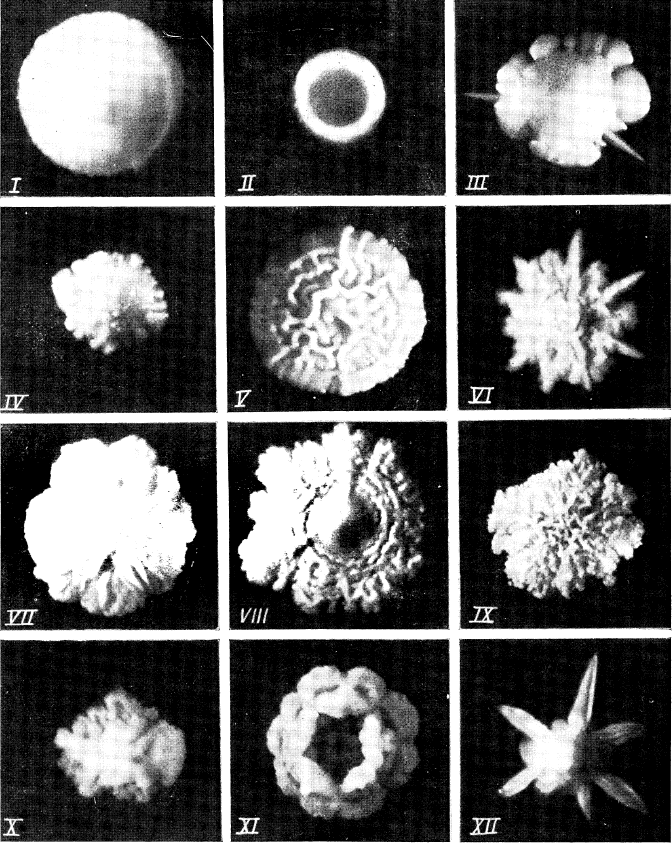 Колонии дрожжей, относящихся к радиорасам разных морфологических групп.